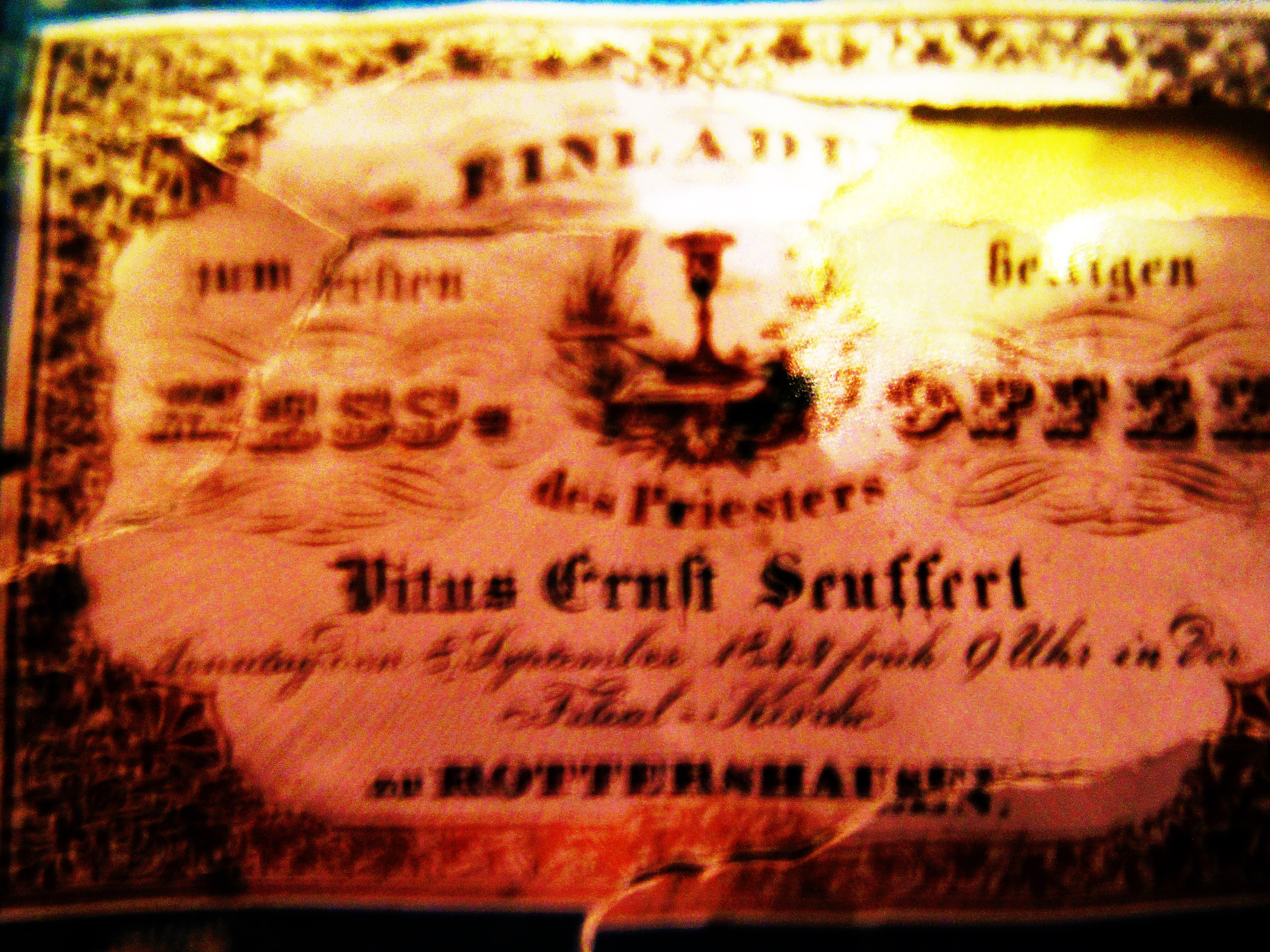 einladung